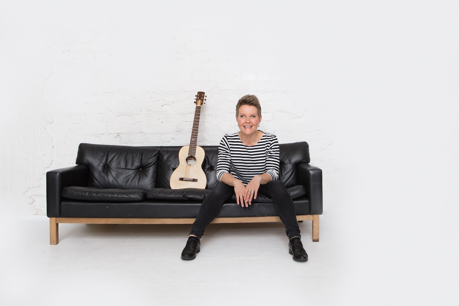 Photo of the Finnish-Swedish Singer and Songwriter Désirée Saarela